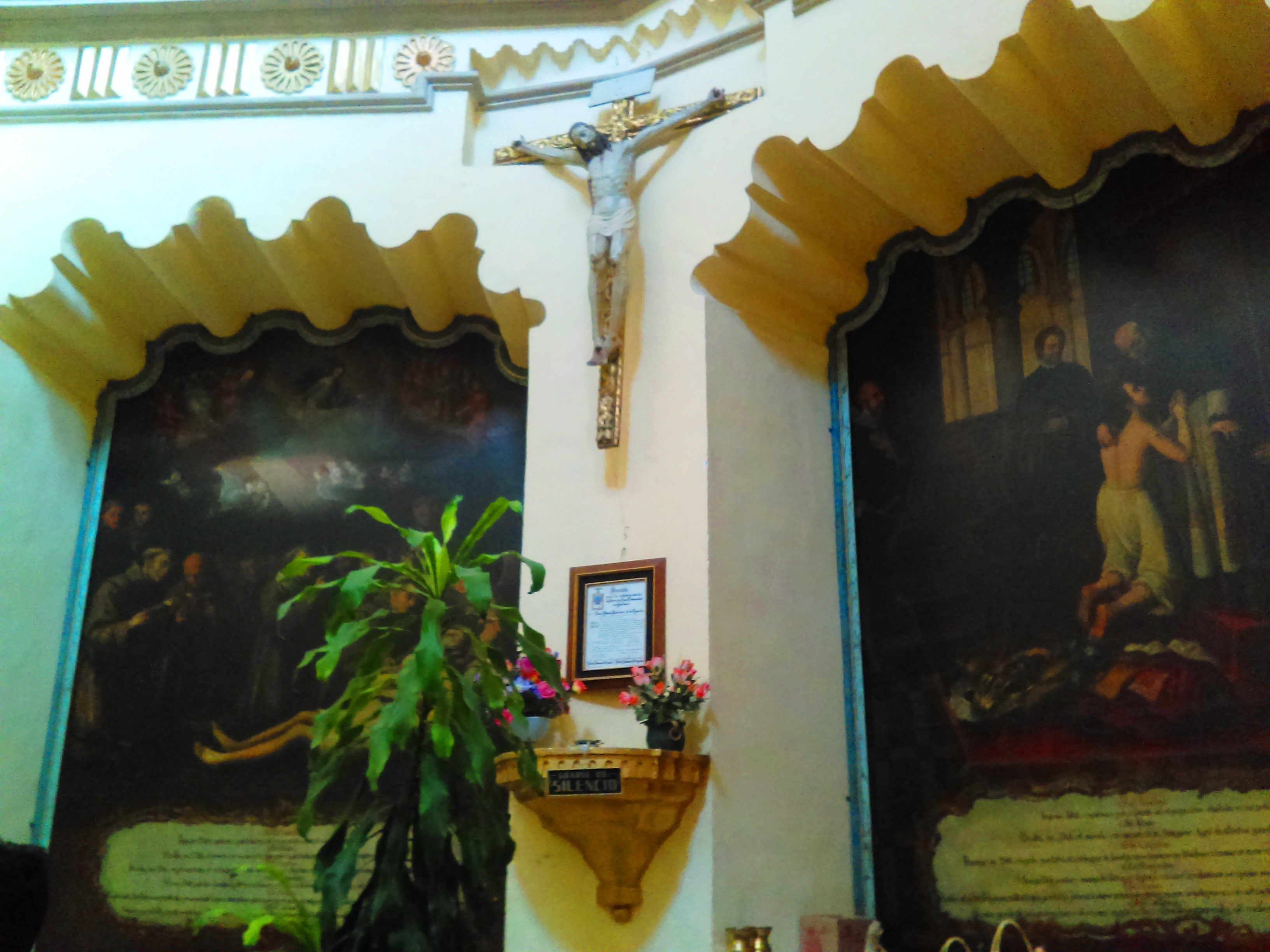 Exconvento de San Francisco en Pachuca, México.